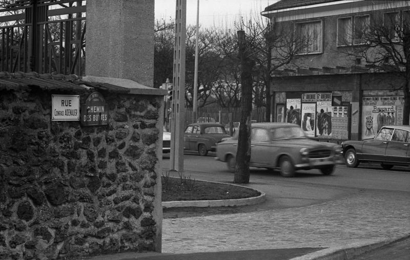 Einweihung der deutschen Botschaftsresidenz, Palais Beauharnais, in Paris. 14-22 "Rue Adenauer" in Rosny-sous-Bois.